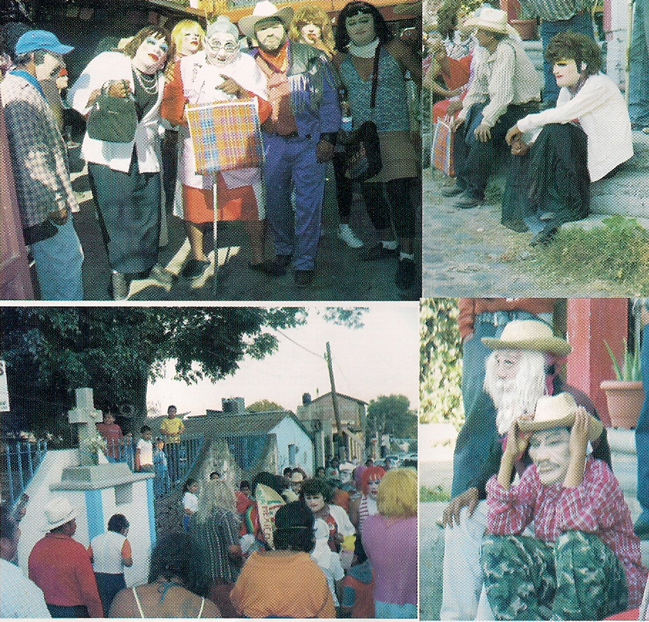 Esta es una imagen del recorrido que hacen los ahuehuenches a traves del pueblo de santa maria